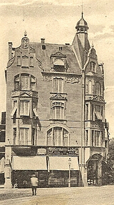 Ausschnitt aus unten angegebener Quelle